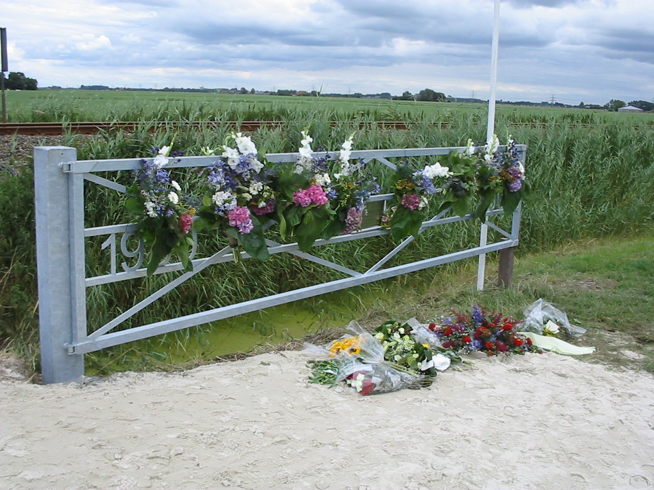 Herinneringshek treinramp Winsum (1980)